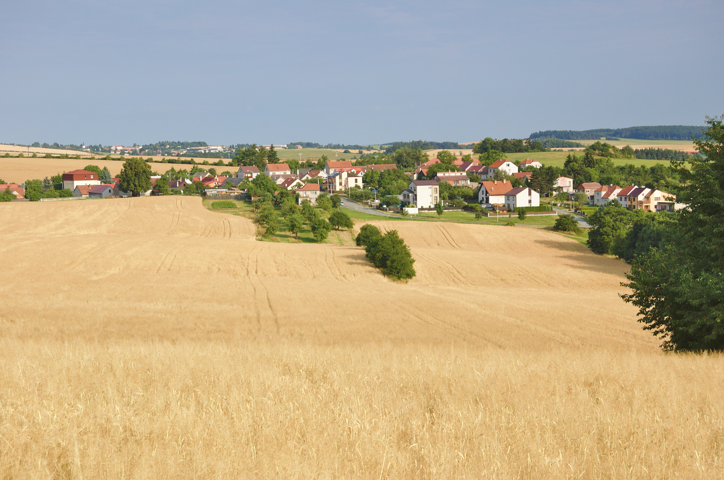 Pohled na Hrochov od východu, Lipová, okres Prostějov